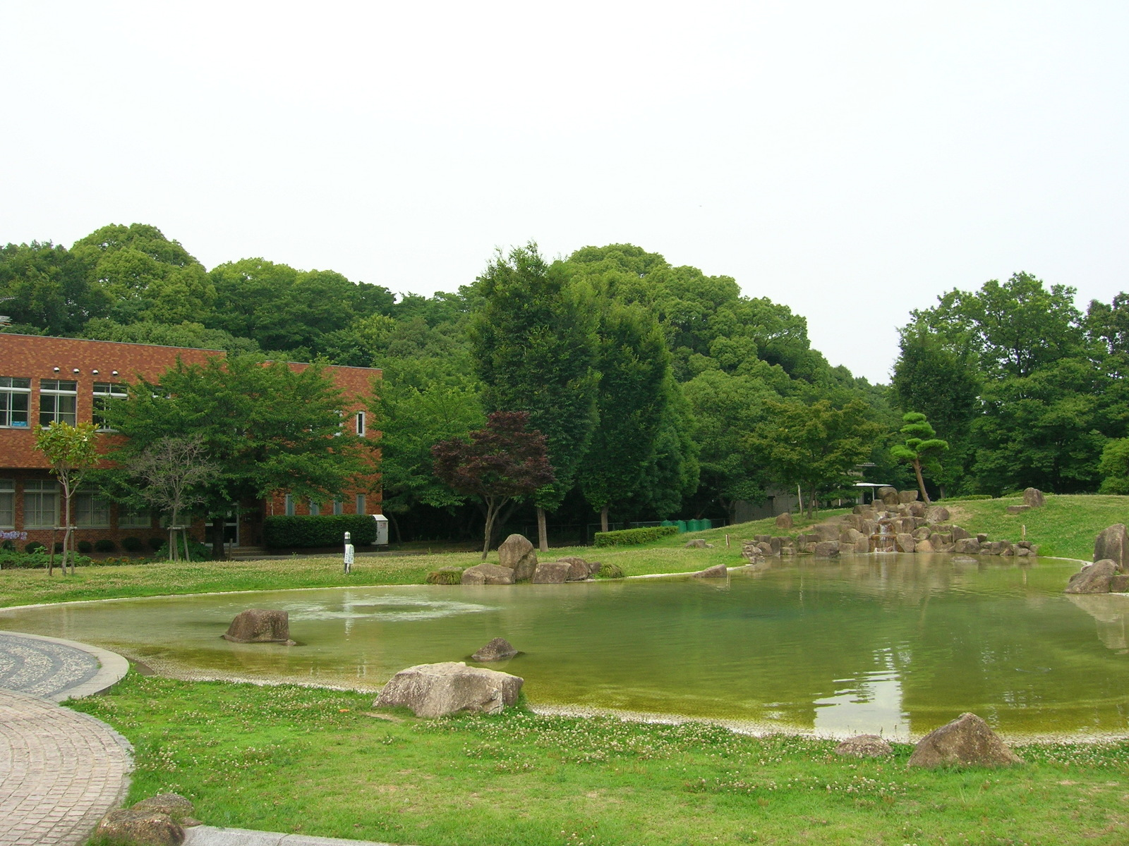 Ajiyoshi Hakusan-jinja kofun (in Ajiyoshi kofun group). Loc: Kasugai city, Aichi Prefecture, Japan. 味美白山神社古墳・墳丘遠景 撮影場所 愛知県春日井市・二子山公園